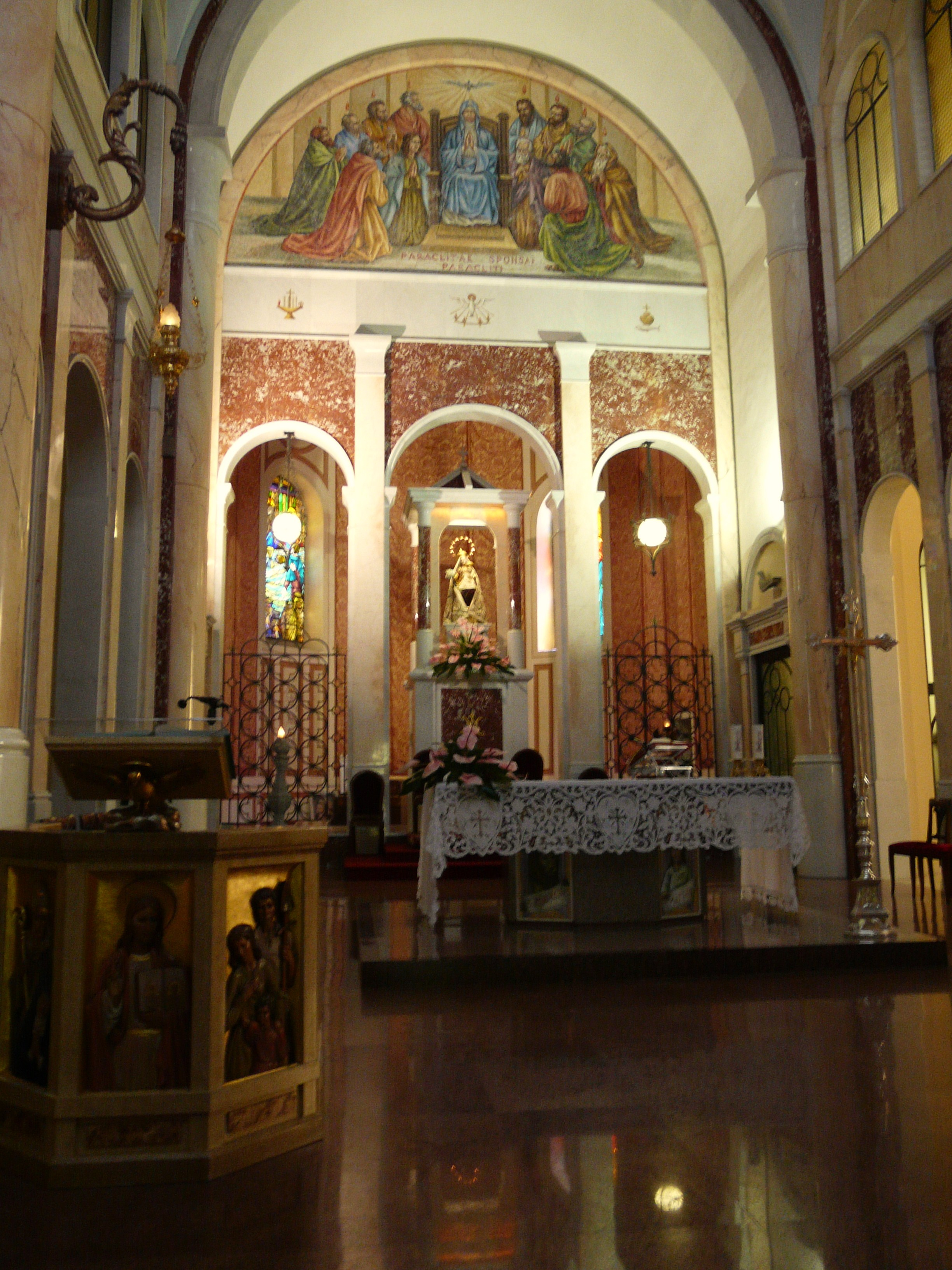 Immagini varie del santuario della Madonna di San Marco, Bedonia, Emilia Romagna, Italia